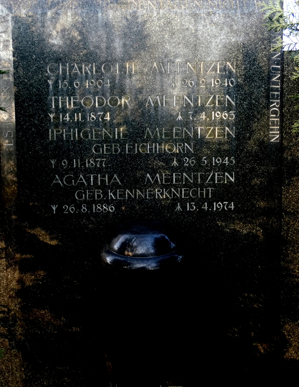 Familiengrab Meentzen Moritzburg; Geburtsjahr Theodor Meentzen muss 1875 heißen.